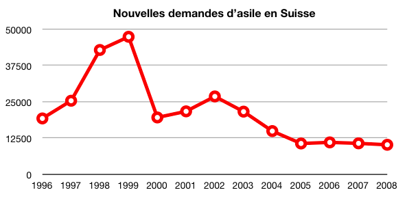 Demandes d'asile en Suisse, 1996-2008.